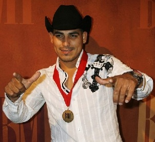 Espinoza Paz durante los 15th Annual Latin Awards in Beverly Hills, California